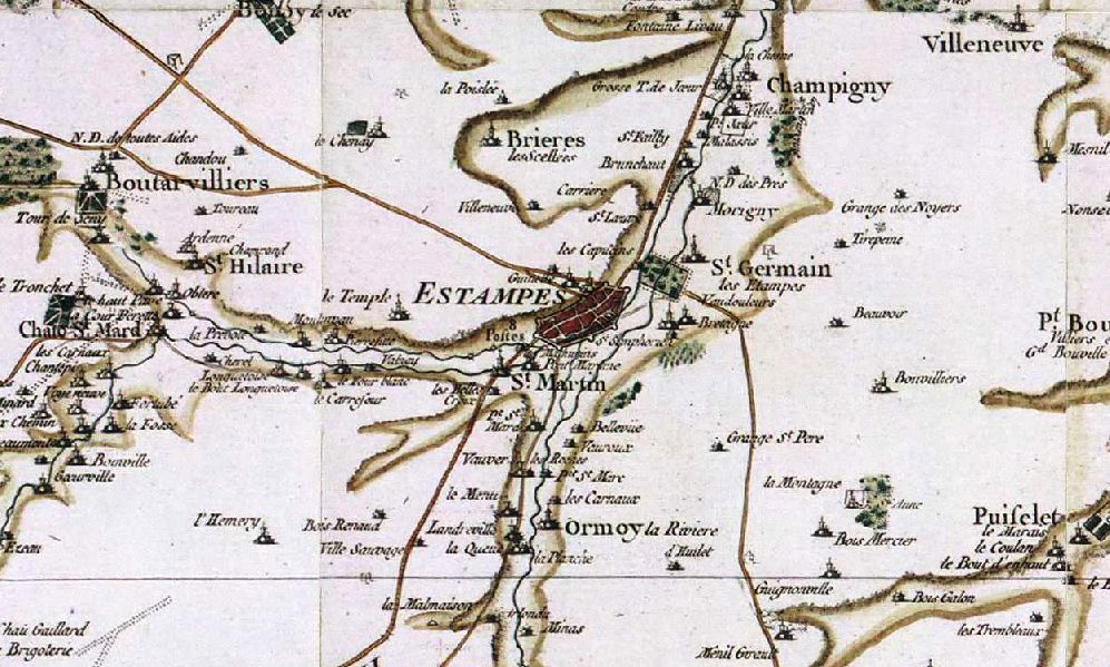 Carte de Cassini représentant la région d'Etampes (Essonne